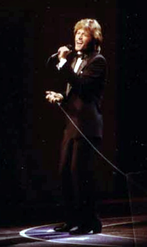 Andy Gibbs